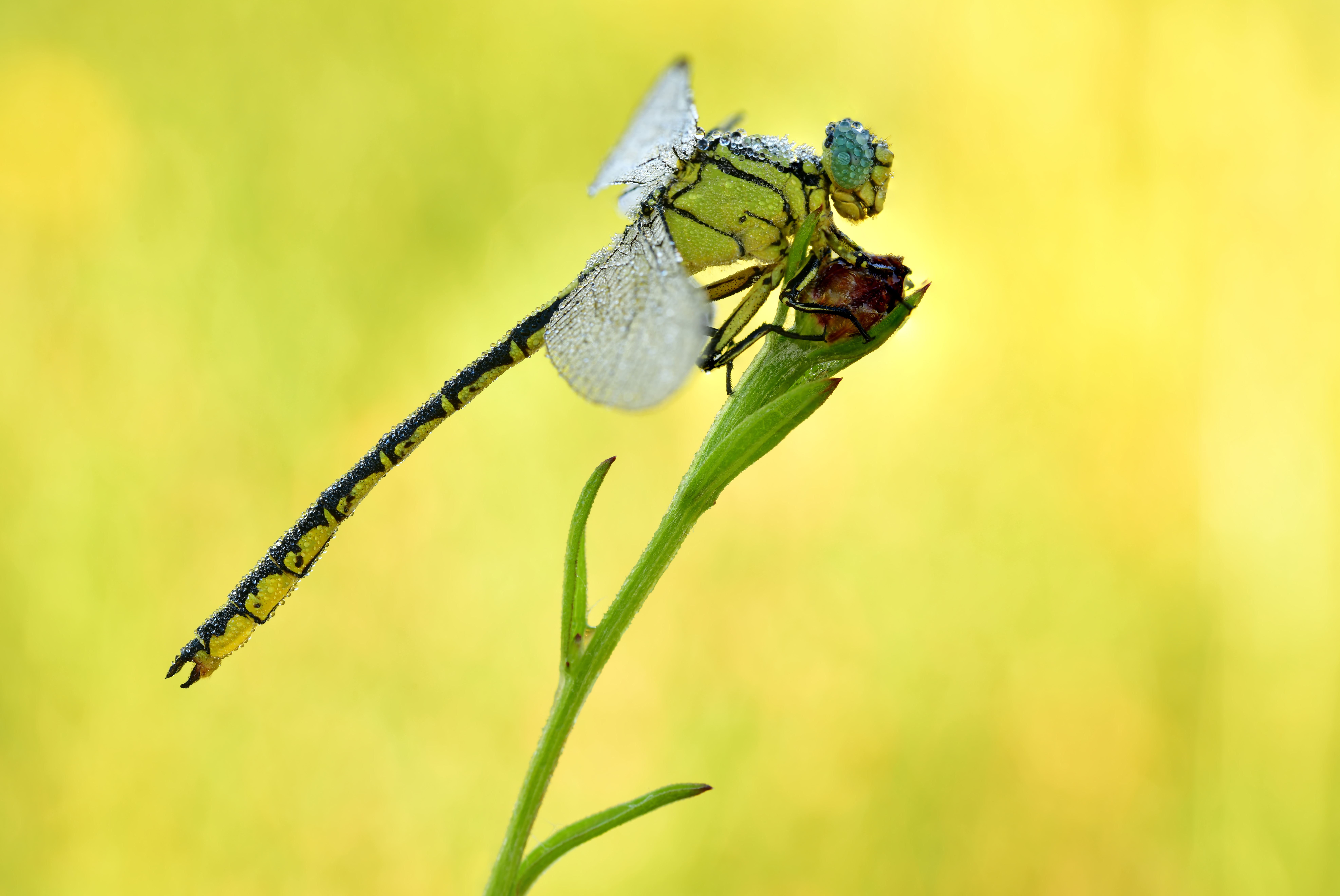 seltener Fund im Biosphärenreservat Flusslandschaft Elbe-Brandenburg bei Rühstädt